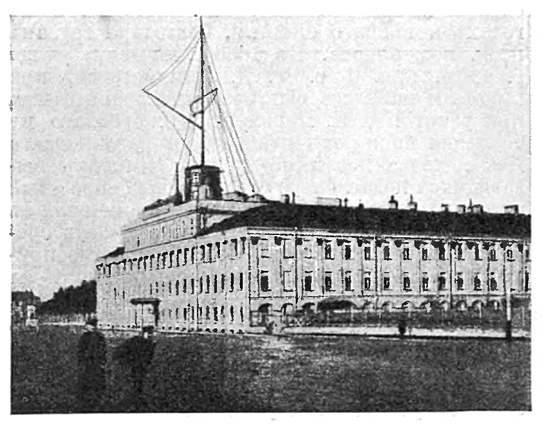 Этот рисунок был использован для иллюстрирования статьи «Морское инженерное училище императора Николая I в Кронштадте» опубликованной в шестнадцатом томе «Военной энциклопедии», который был издан книгоиздательским товариществом И. Д. Сытина в 1914 году в столице Российской империи городе Санкт-Петербурге. Более подробное описание к этой иллюстрации можно прочесть в указанной выше статье на сайте Русской Викитеки.